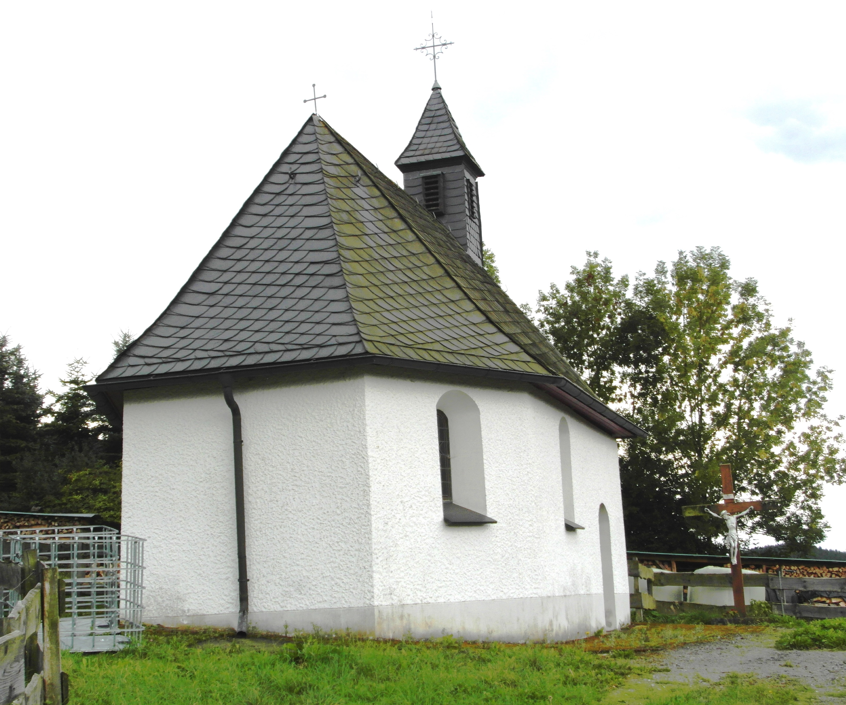 denkmalgeschützte Kapelle St. Agatha in Ramscheid (Finnentrop)